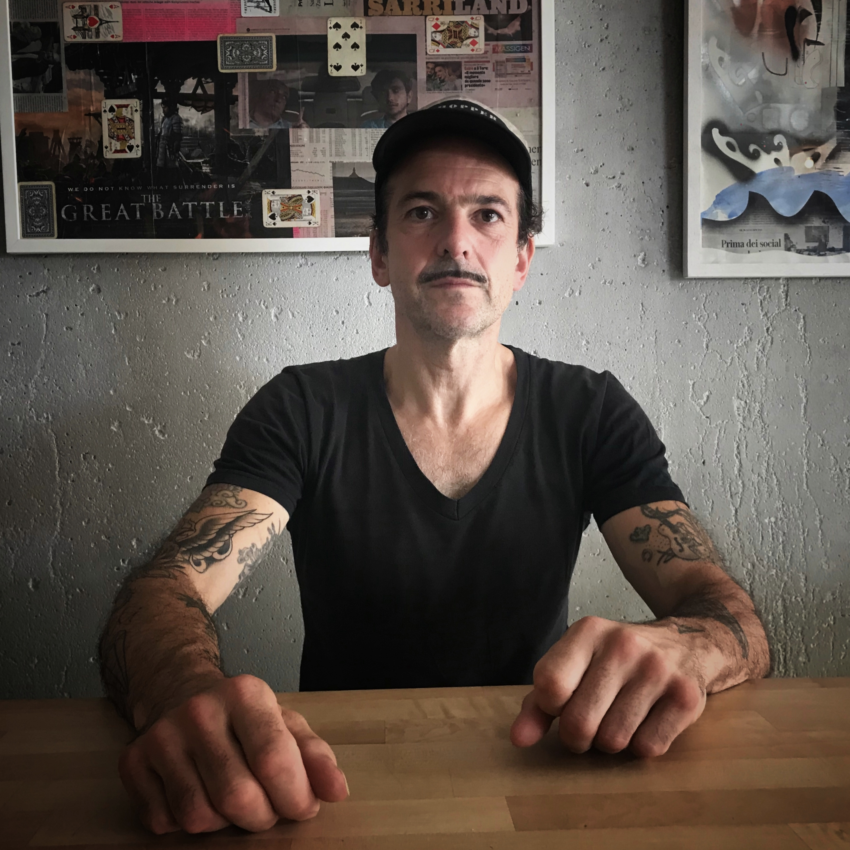 Marcus Sendlinger fotografiert von Gregor Hutz in Berlin 2019